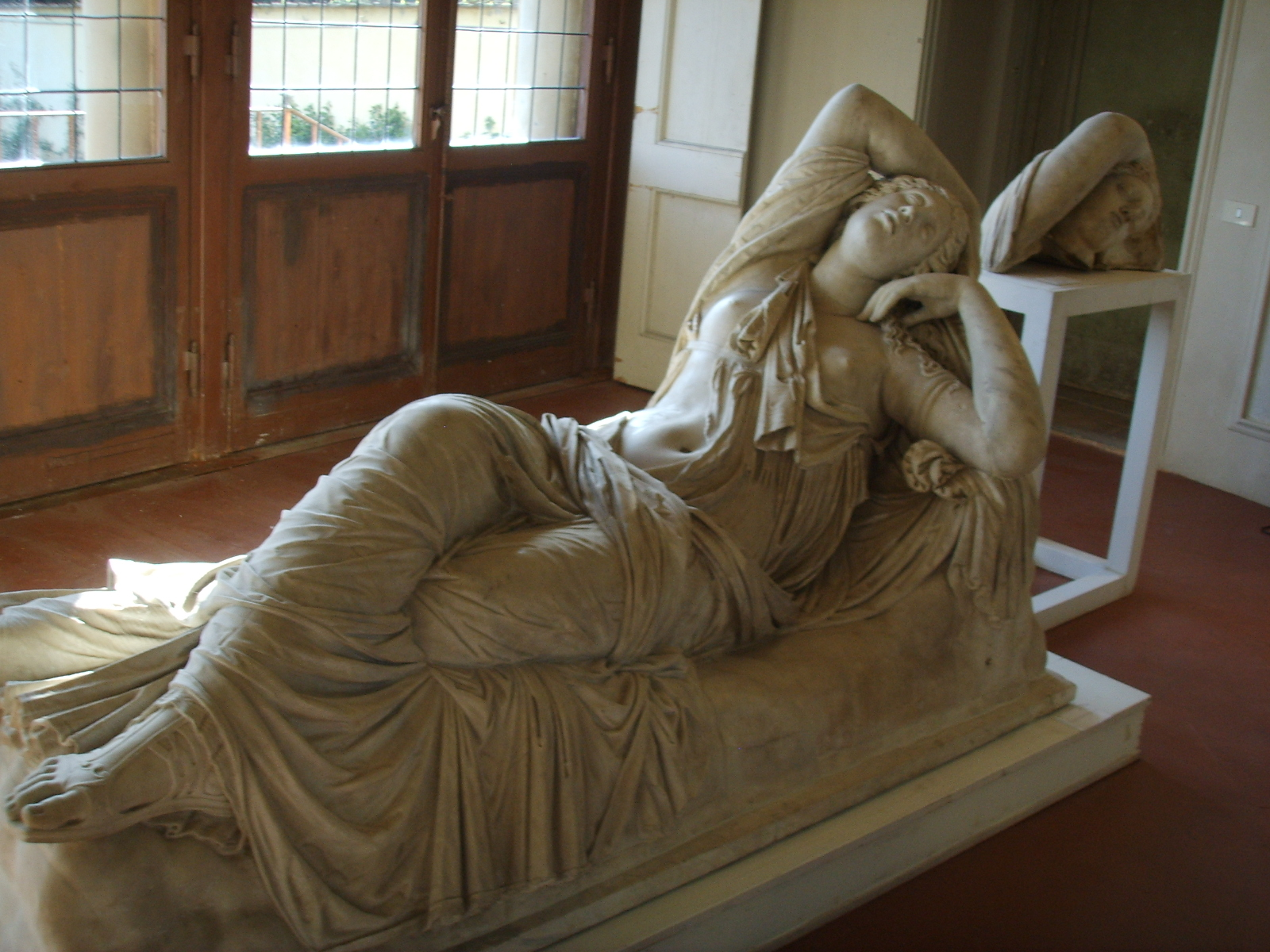 Arianna dormiente, copia romana da originale greco degli inizi del II sec ac. La statua è stata poi trasferita agli Uffizi.